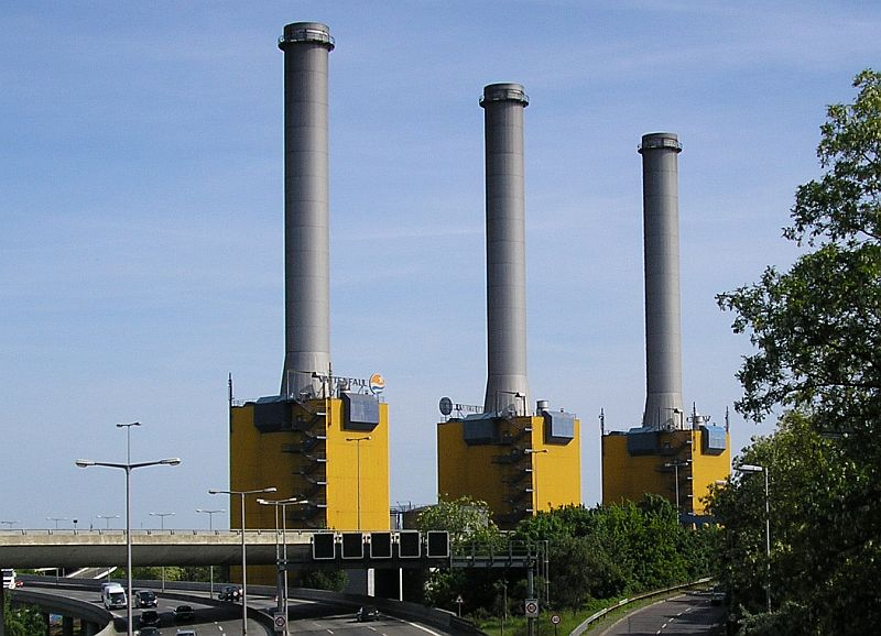 Kraftwerk Wilmersdorf, Berlin